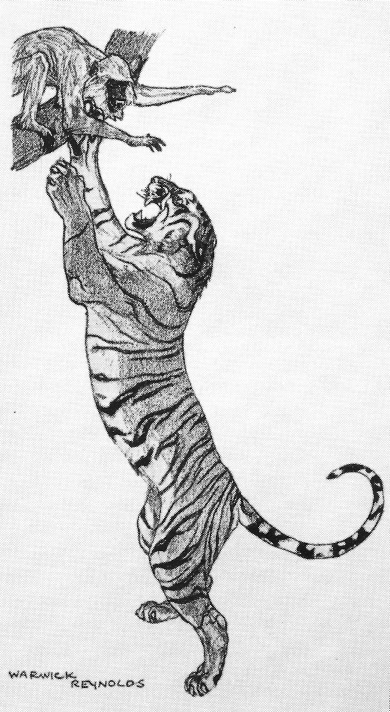 Tiger attacking a Langur